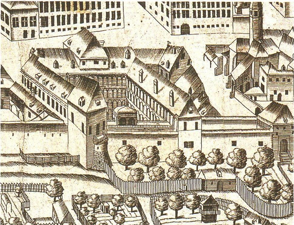 Skica Knežjega dvorca na prospektu Ljubljane okoli 1665